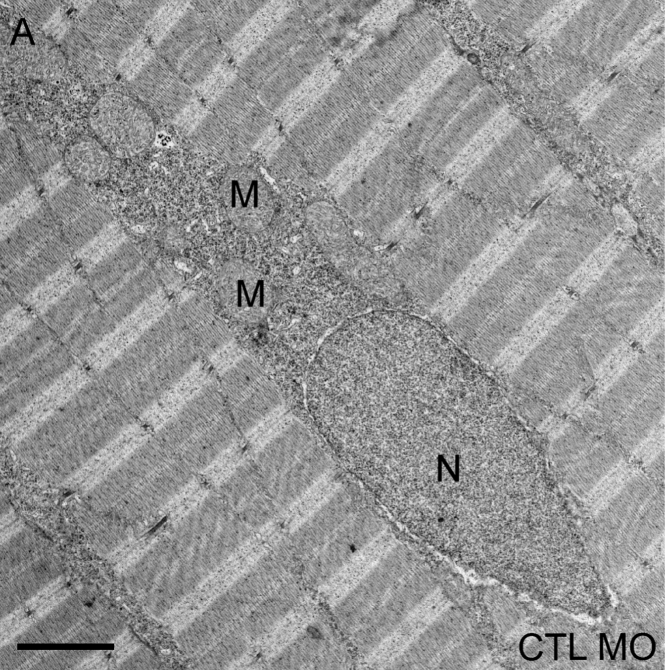 Figura 4. Ultraestructura perinuclear. (A, B) Los embriones de control tenían mionúcleos delgados (N) con compartimentos y orgánulos perinucleares bien organizados (M= mitocondrias). Barra de escala 2μm.